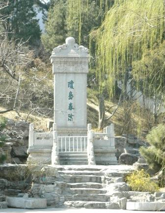 琼岛春荫 用心阁于2005年3月29日拍摄于北海公园